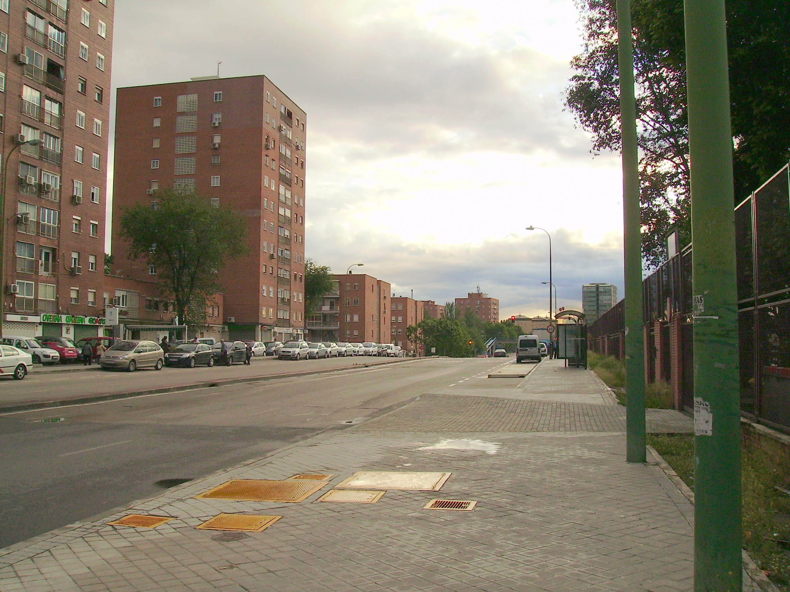 Avda de los Poblados